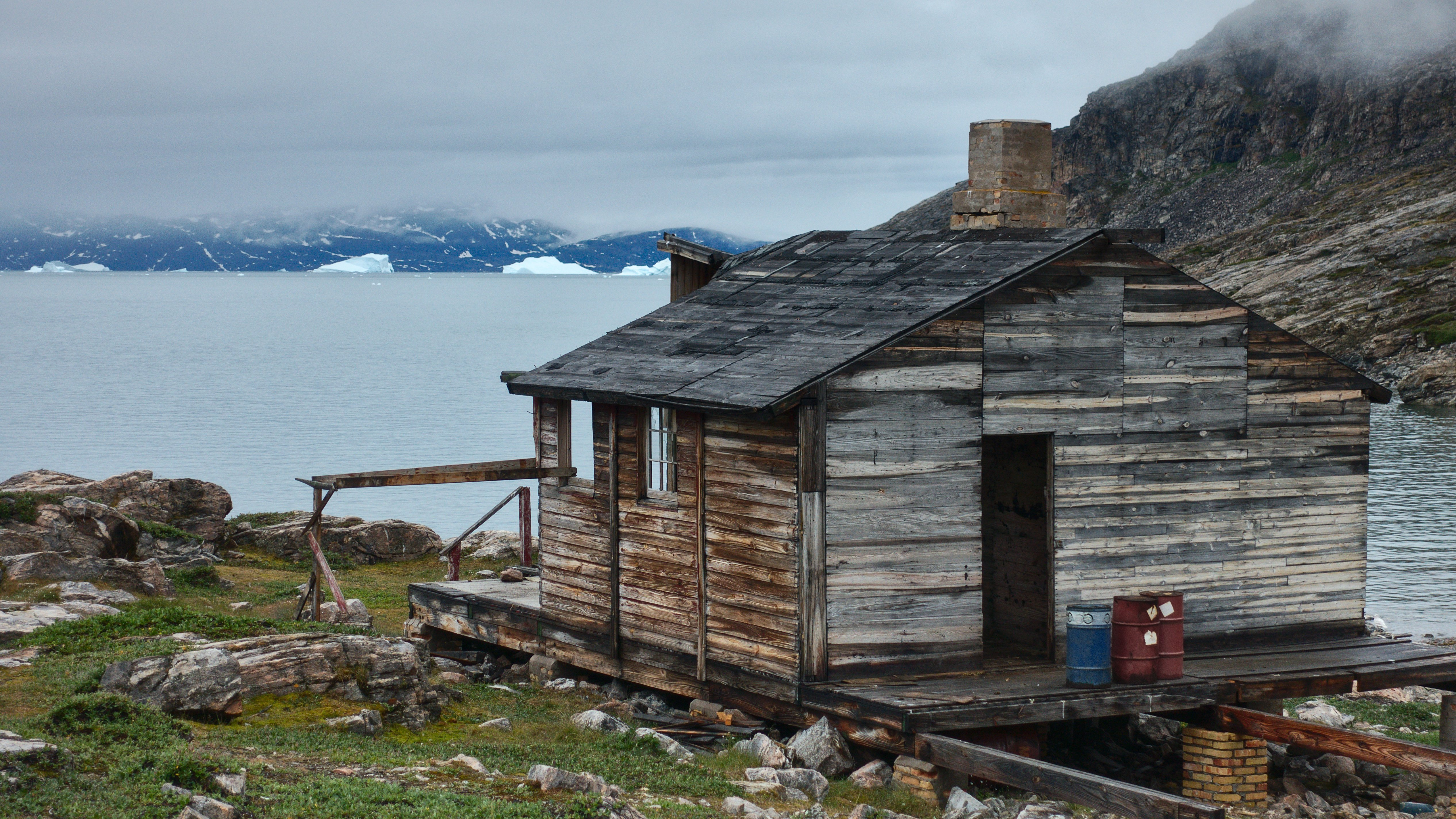 Greenland